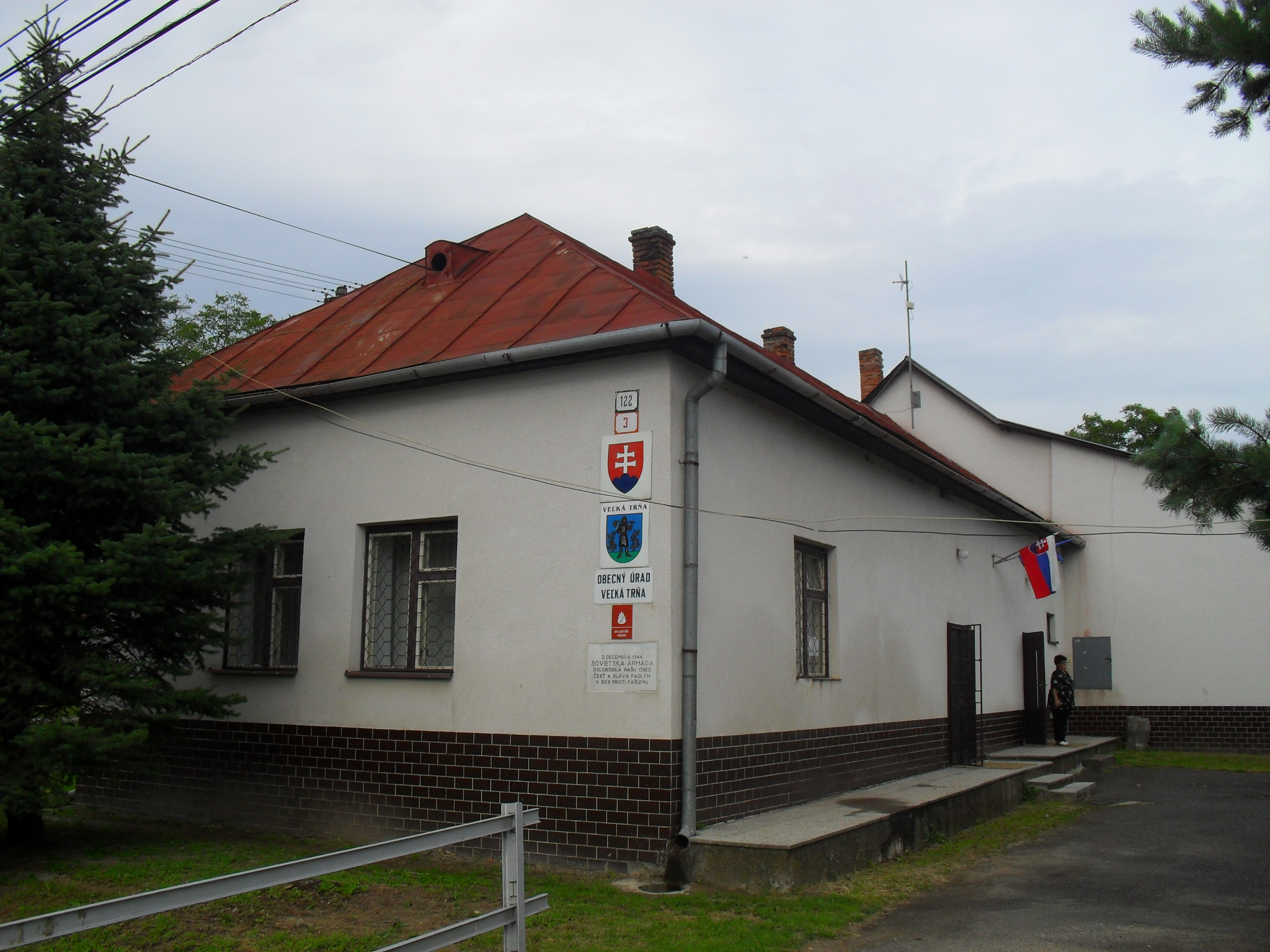 Nagytoronya - községi hivatal